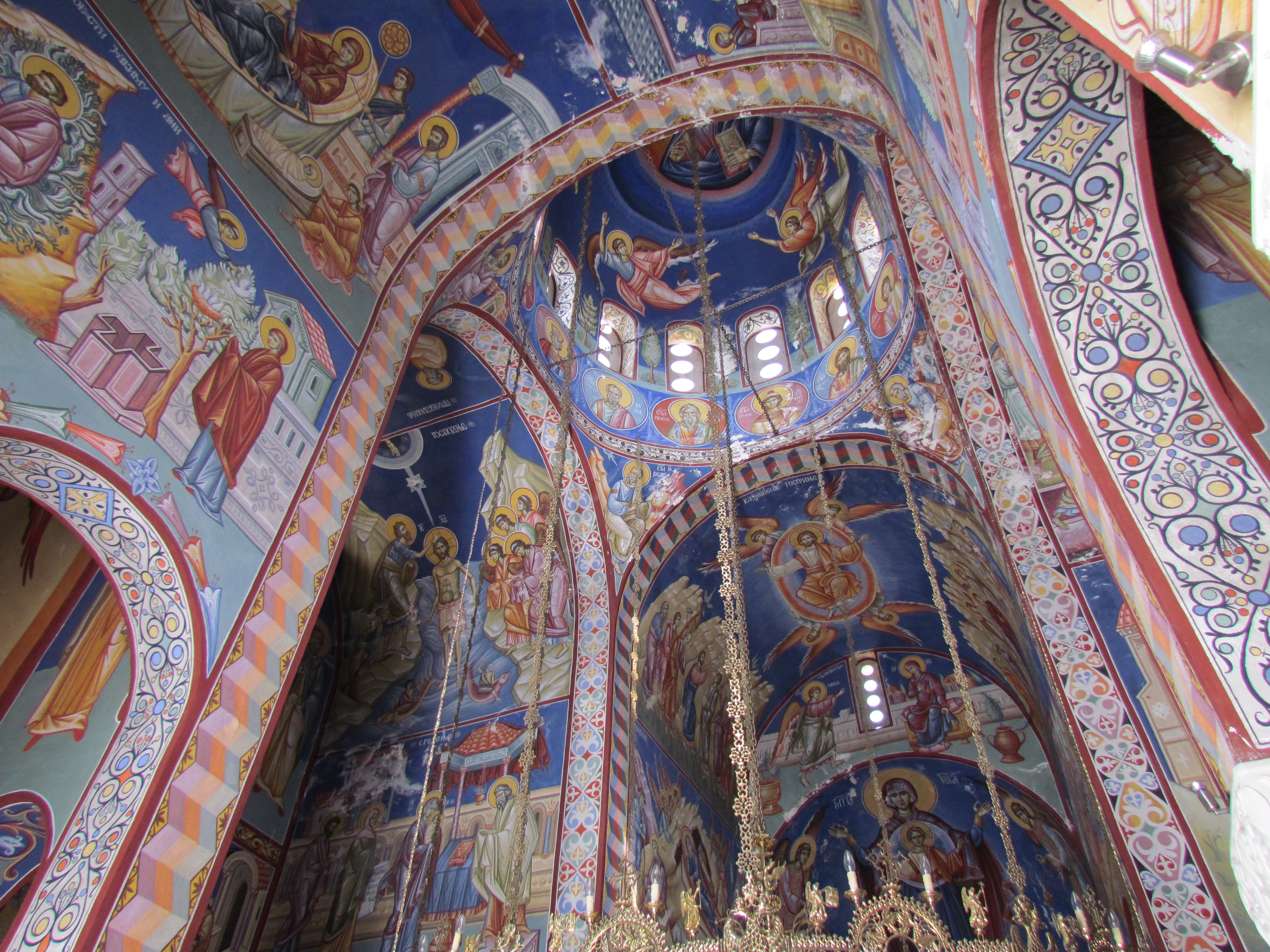 Hercegovska Gračanica je verna kopija samostanske cerkve Gračanica na Kosovu. Zgrajena je bila leta 2000 na griču Crkvina nad Trebinjem, da bi se izpolnila zadnja želja slavnega trebinjskega pesnika Jovana Dučića.